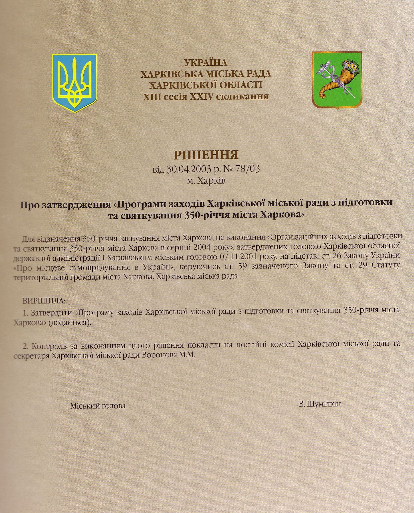 Официальное постановление о 350-летии города Харькова. 2003. Подпись мэра Владимира Шумилкина (не подписано).